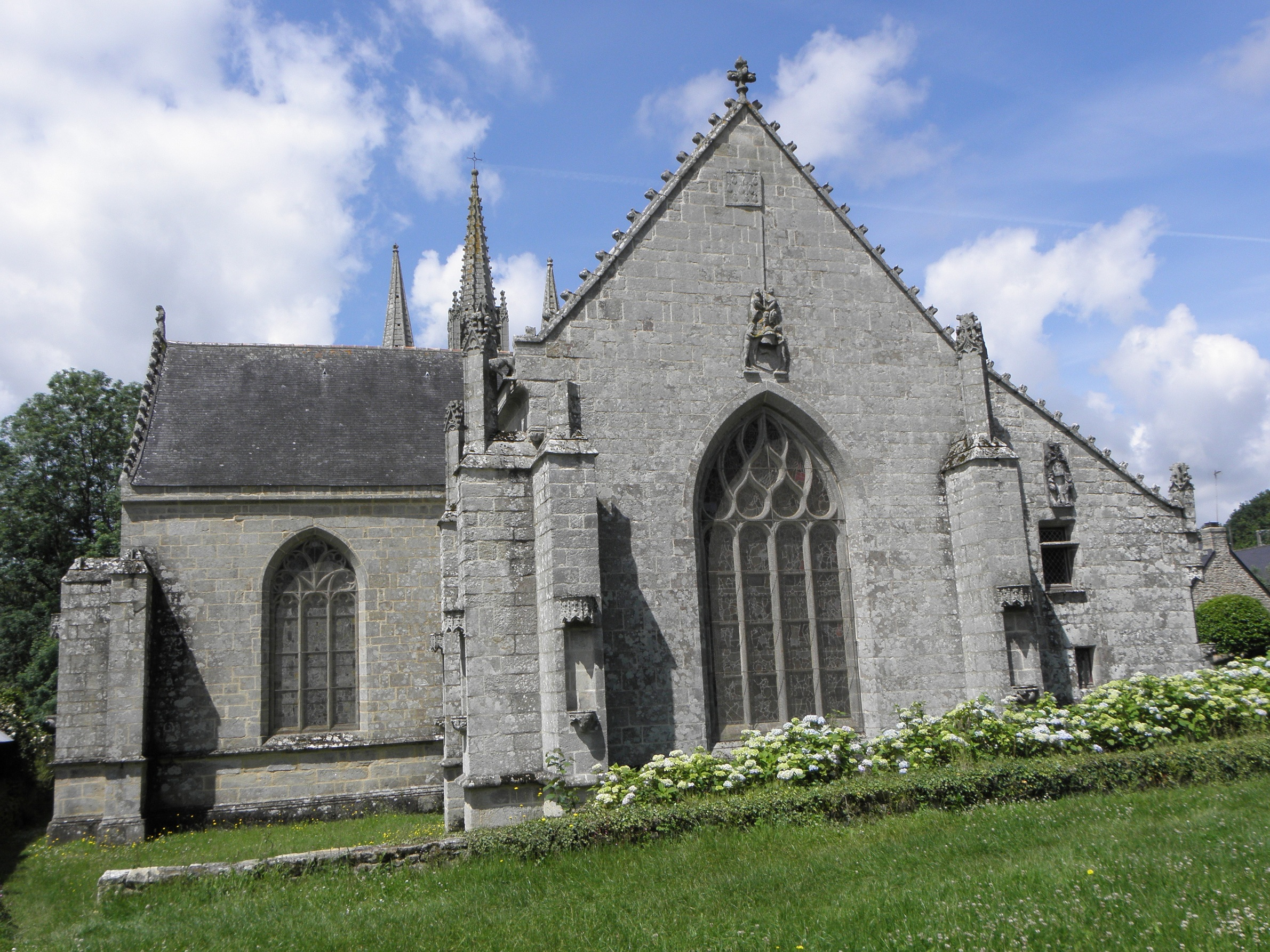 Chevet de la chapelle saint-Fiacre du Faouët (56). .